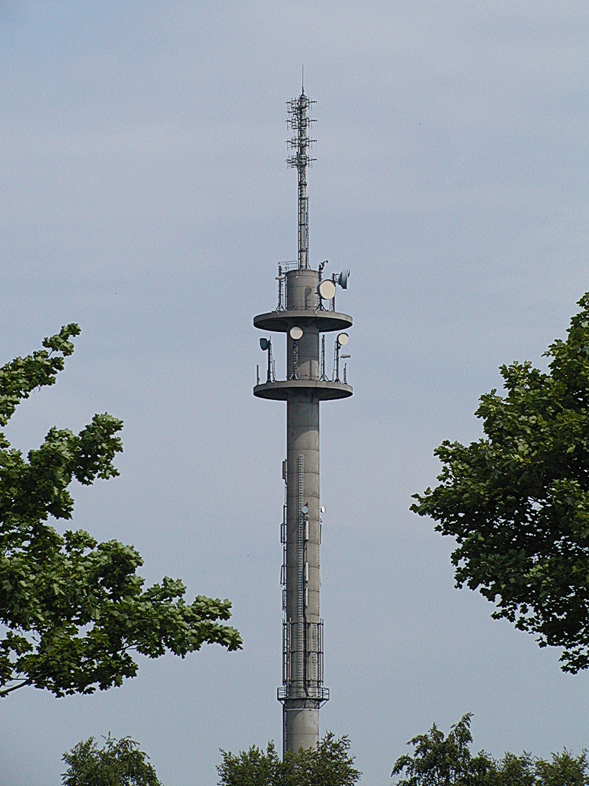 Der Sendeturm in Otterndorf